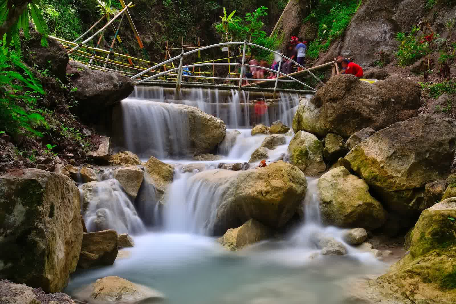 kedung pedut